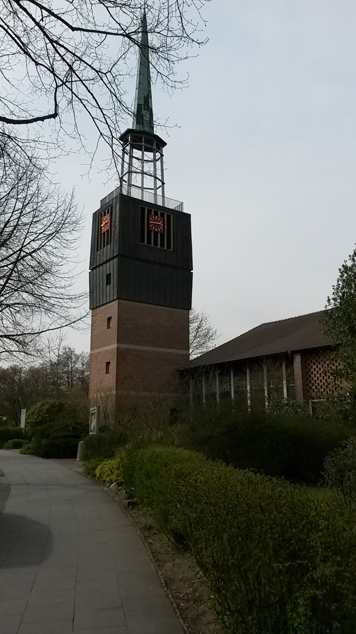 Es zeigt den Kirchturm von etwas weiter weg